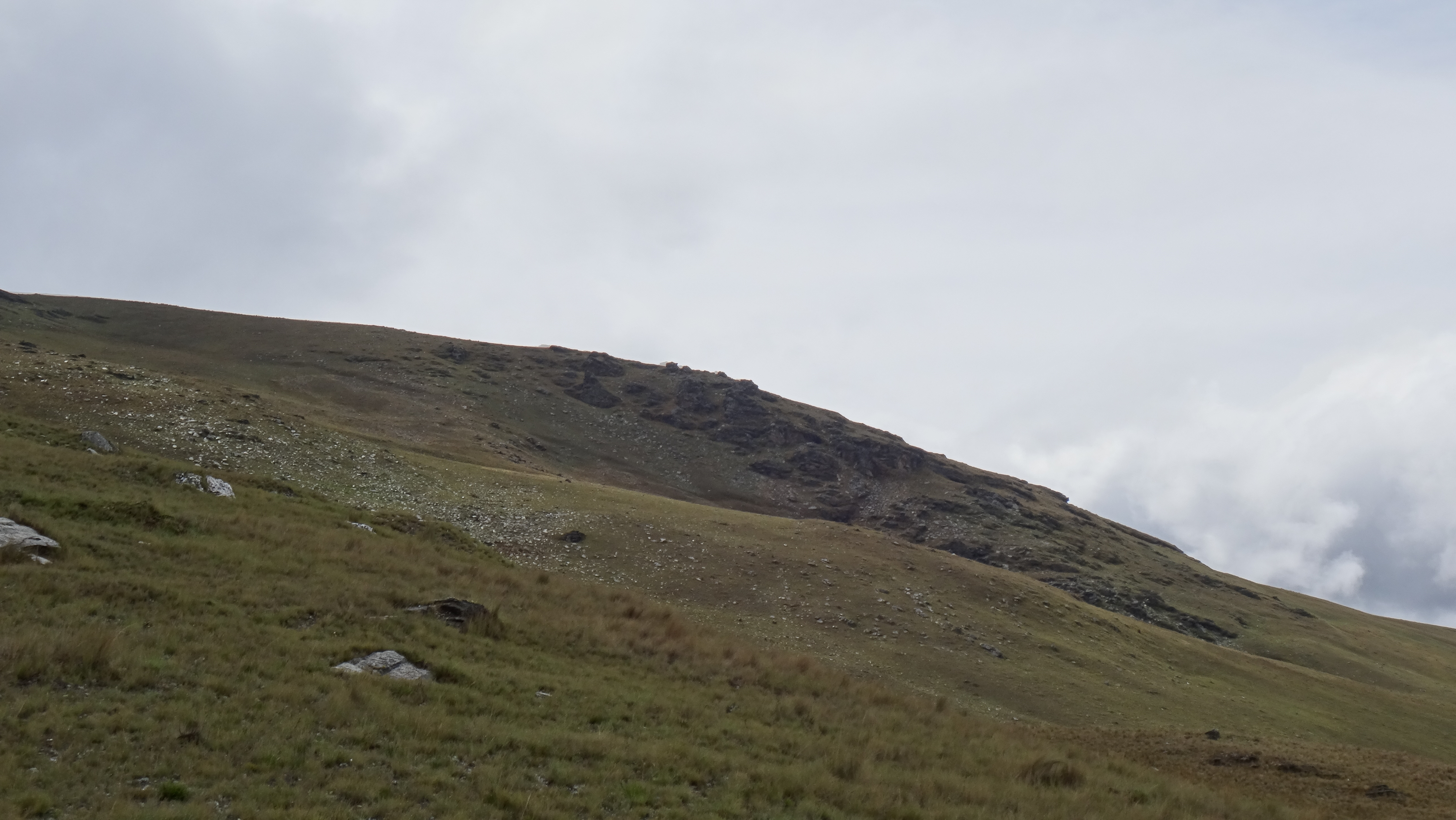 Vista de la cima de la montaña Susupillo.